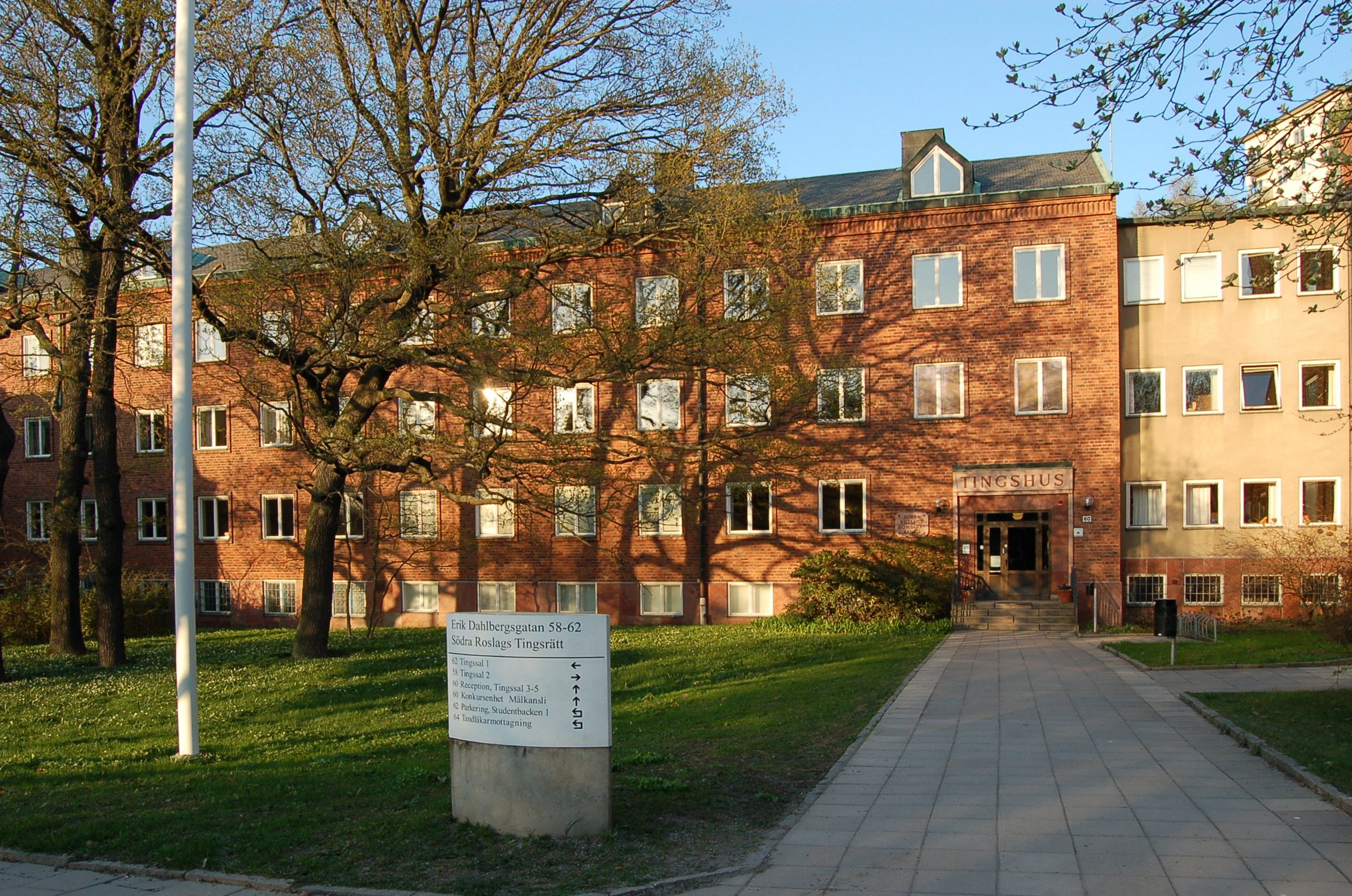 Fasaden på Södra Roslags tingsrätt på Erik Dahlbergsgatan i Stockholm. Arkitekt Karl Karlström. Byggnadsår tingshus 1950-51. Uppört för Åker, Värmdö och Danderyd skeppslags samt Vaxholms stads tingslag